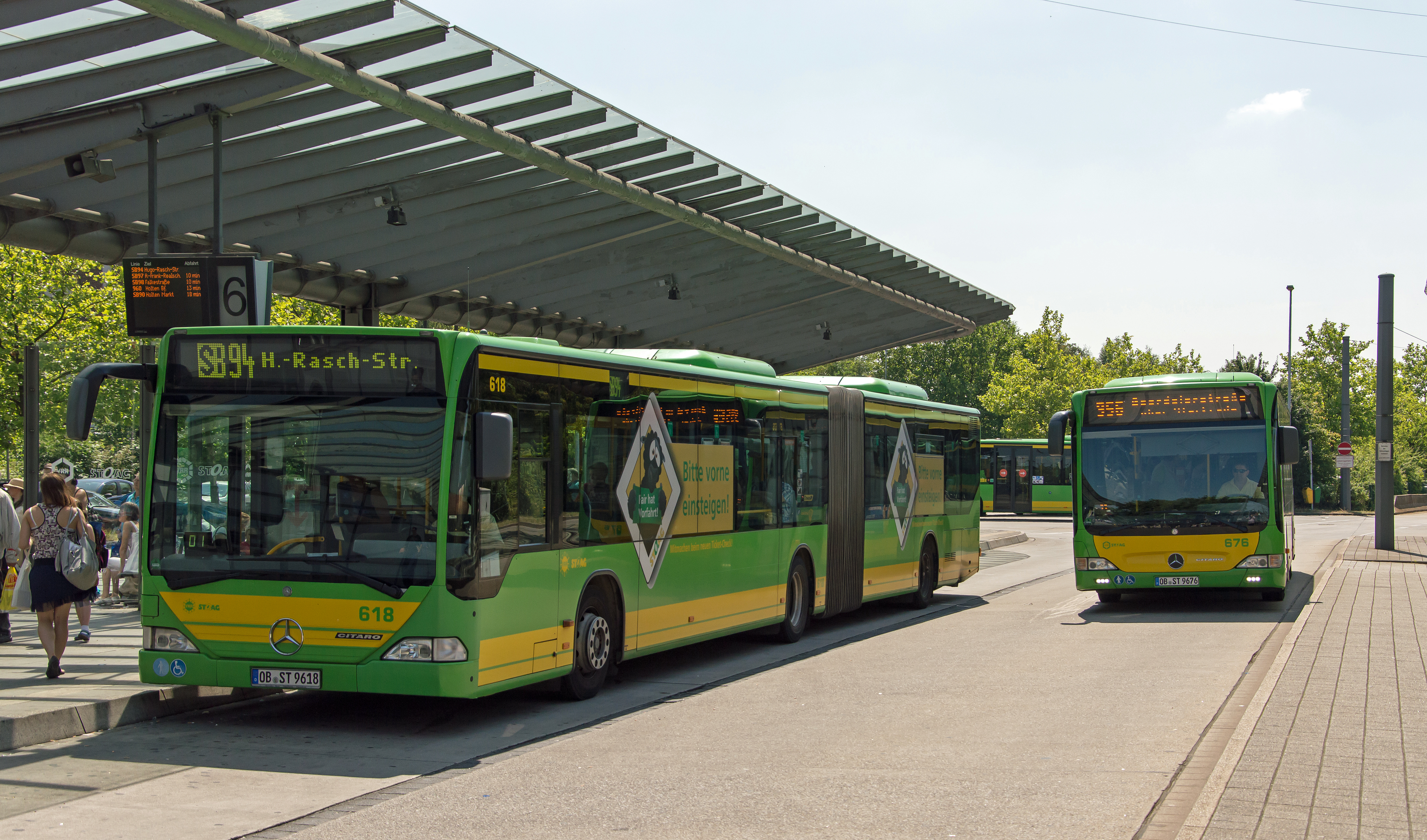 Oberhausen Sterkrade VRR STOAG 618 voorbij gereden door 676